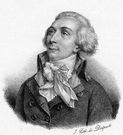 Portrait of Louis-Michel Lepeletier de Saint-Fargeau (1760-1793), French revolutionary